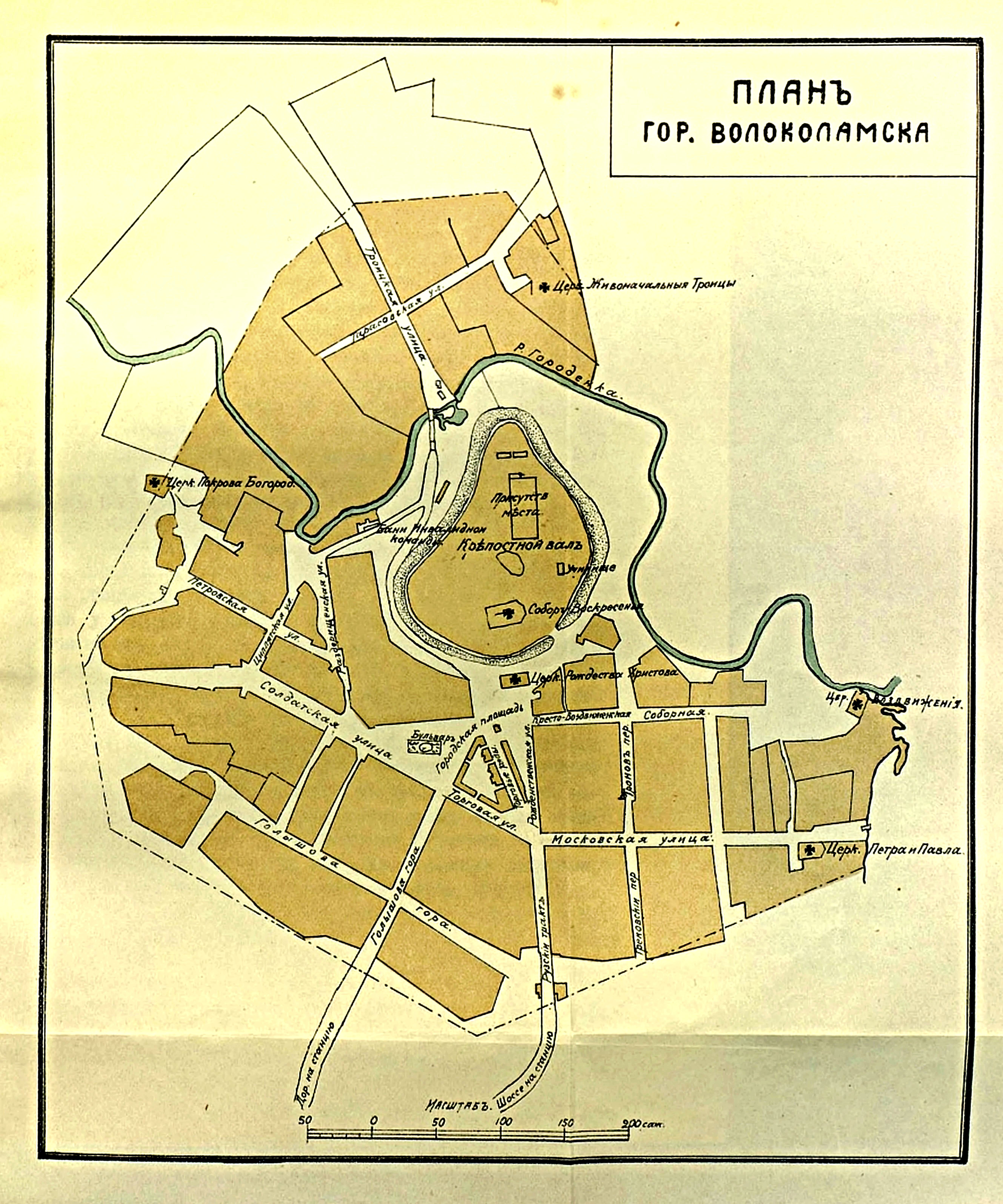 План Волоколамска в 1909 году. "Спутник по Московско-Виндавской железной дороге". М. : Печатня С. П. Яковлева, 1909